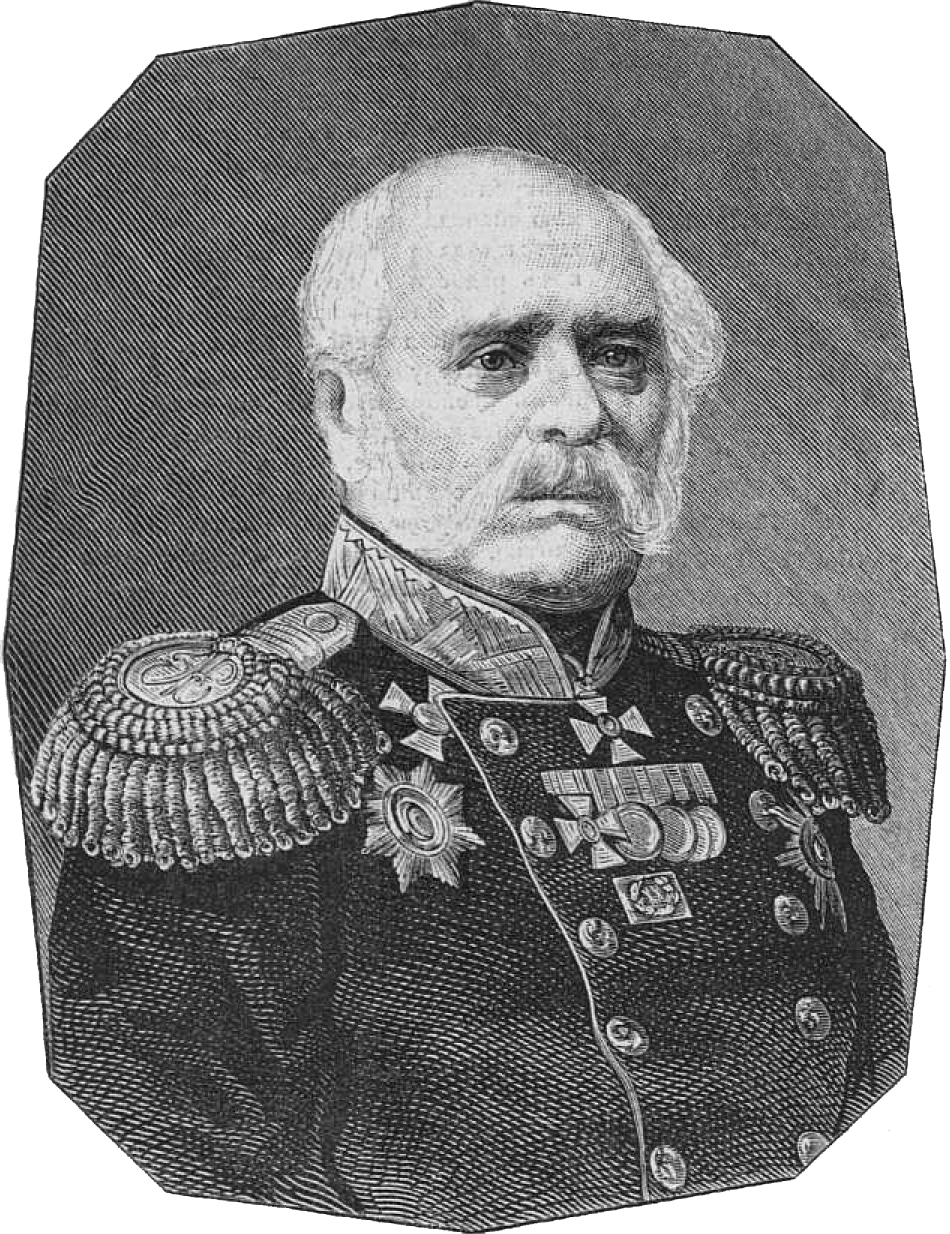 Генерал-адъютант Бибиков Дмитрий Гаврилович, 1850-е годы